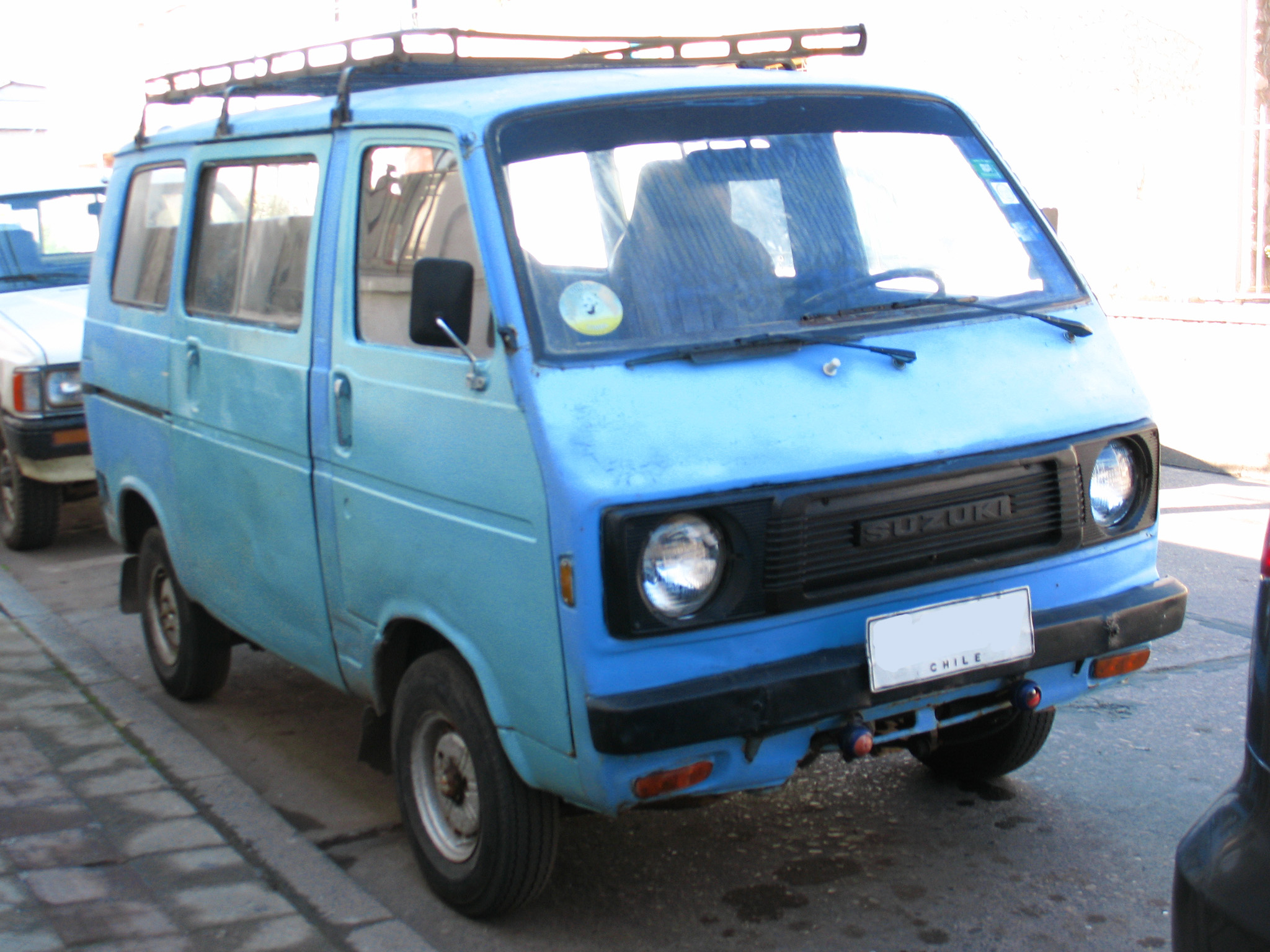 Suzuki Carry ST-90 1979